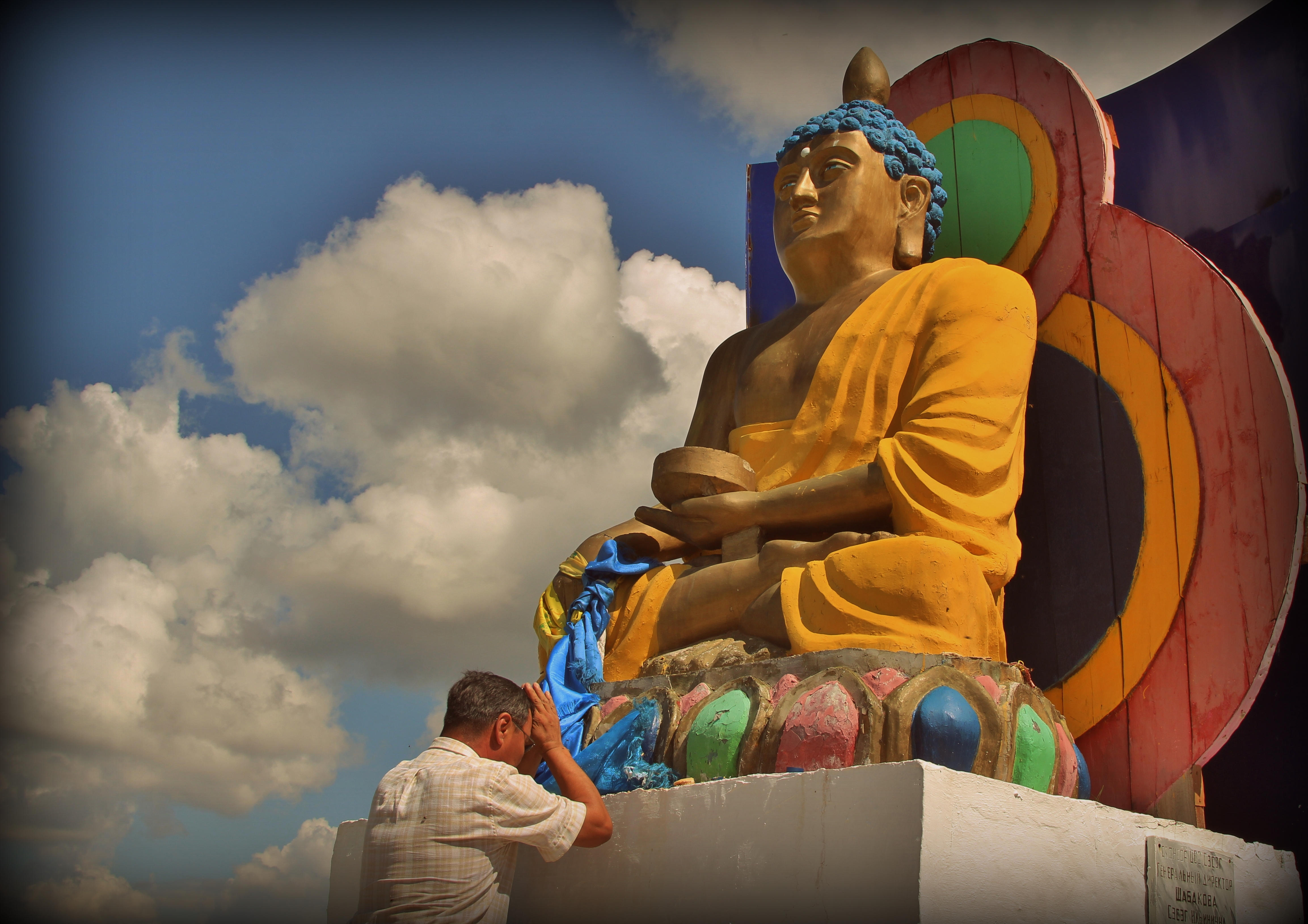 Статуя Будды Шакьямуни на въезде в Джидинский район Бурятии. Скульптор - Геннадий Васильев